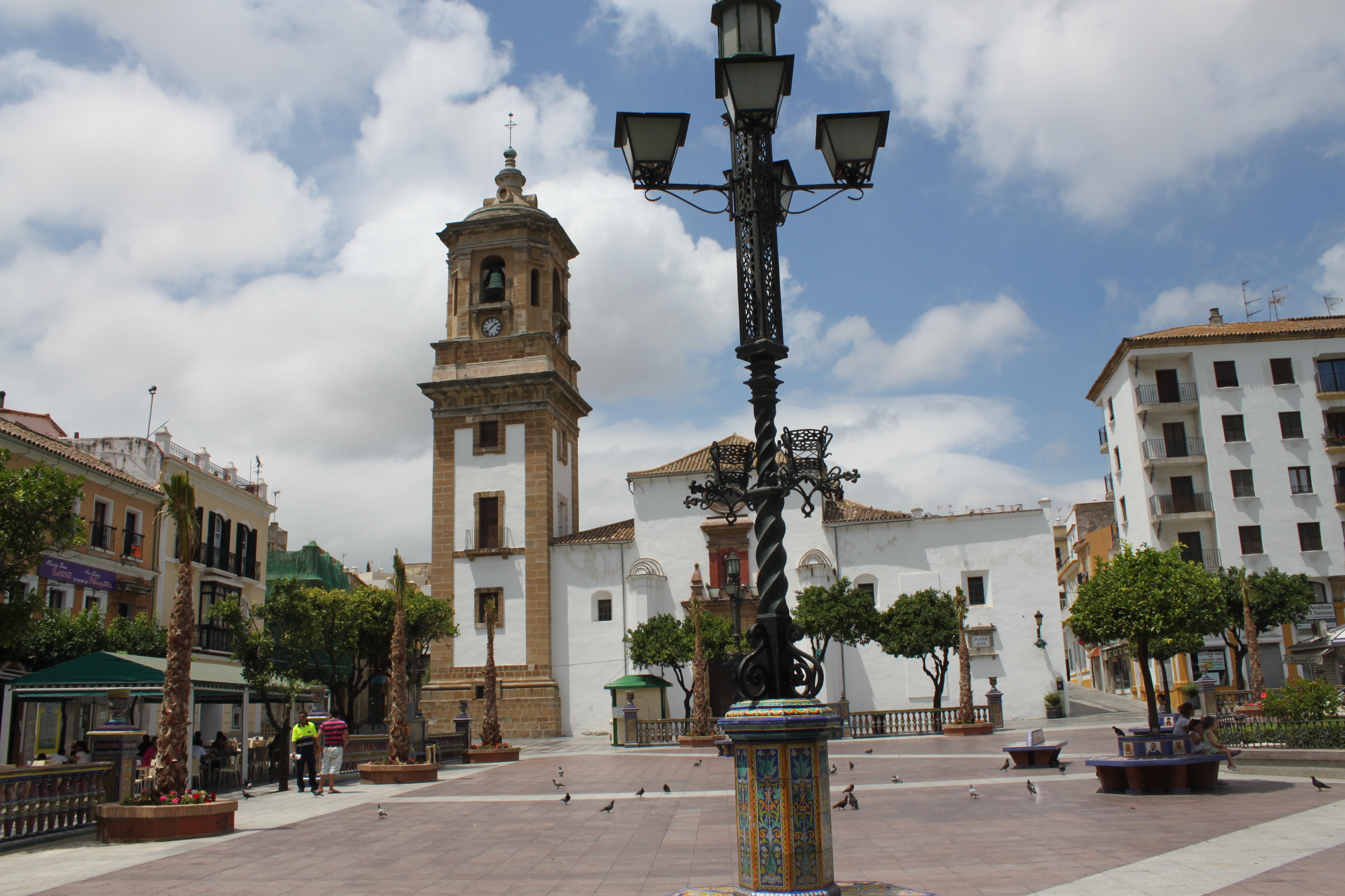 Vista de la Plaza Alta de Algeciras con la Iglesia de Nuestra Señora de la Palma. Andalucía, España.